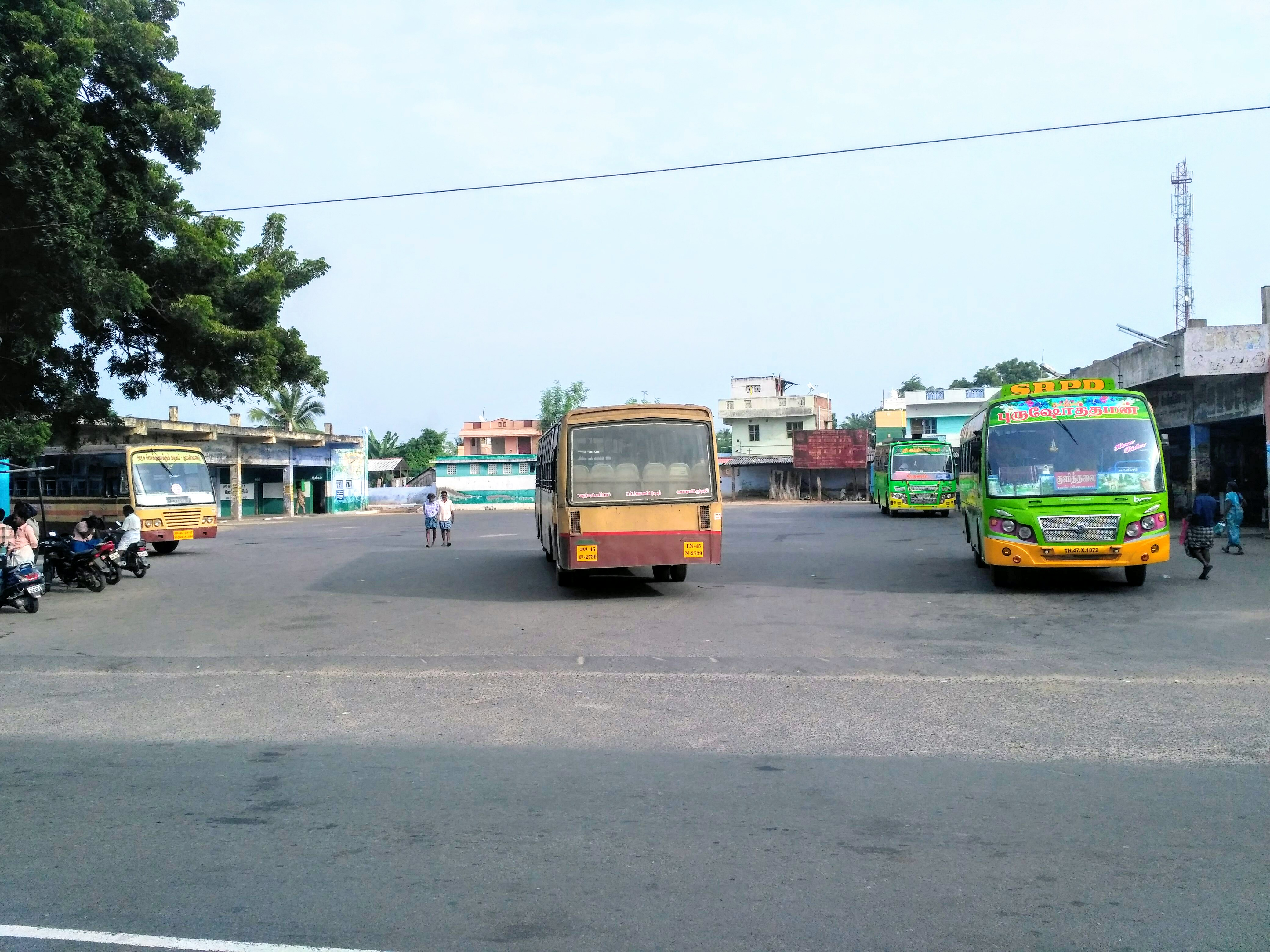 முசிறி பேருந்து நிலையம்...